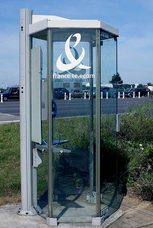 Cabine téléphonique - Pont de Normandie - France Telecom